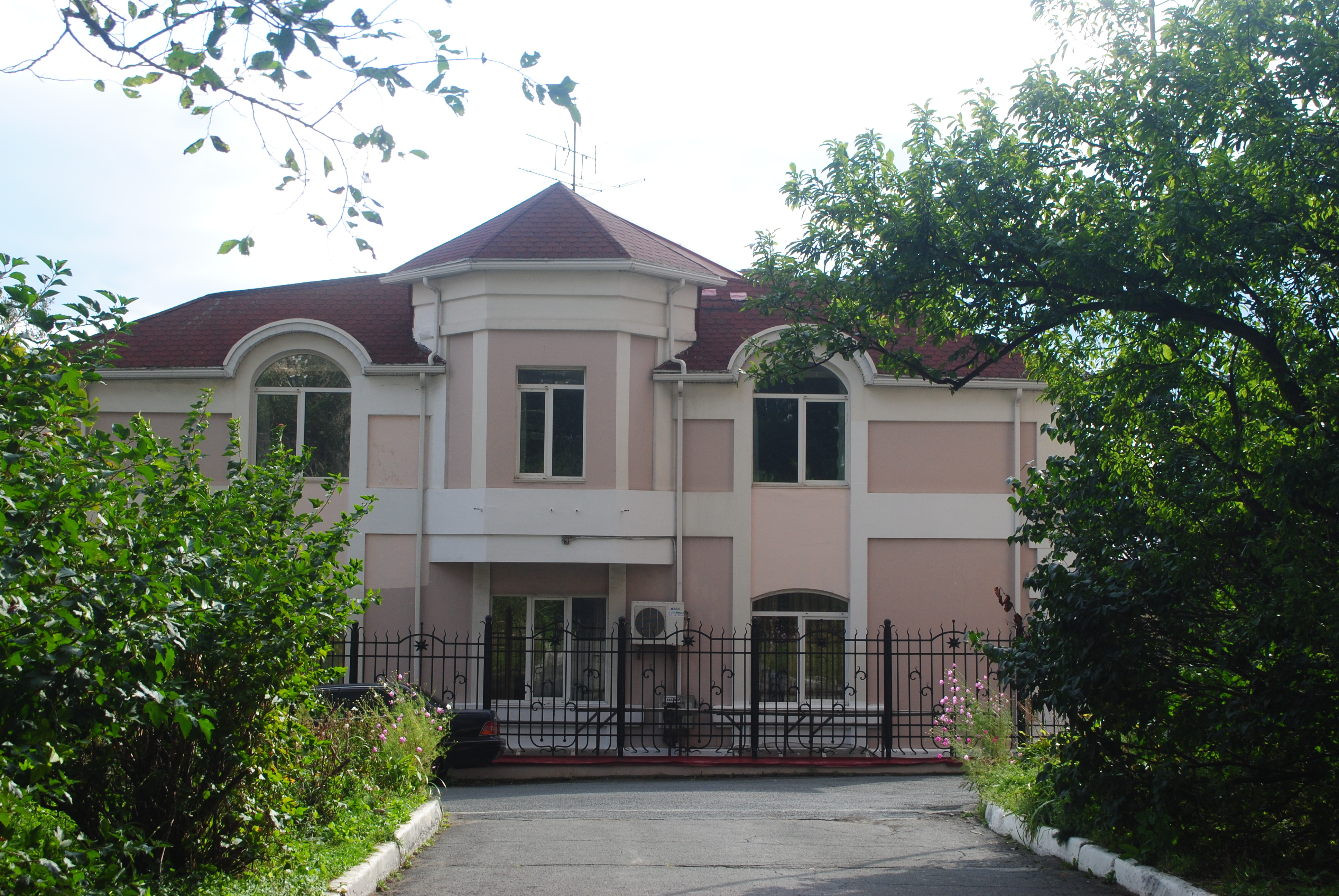 Особняк коменданта Владивостокской крепости: улица Бестужева, 37, Владивосток, Приморский край